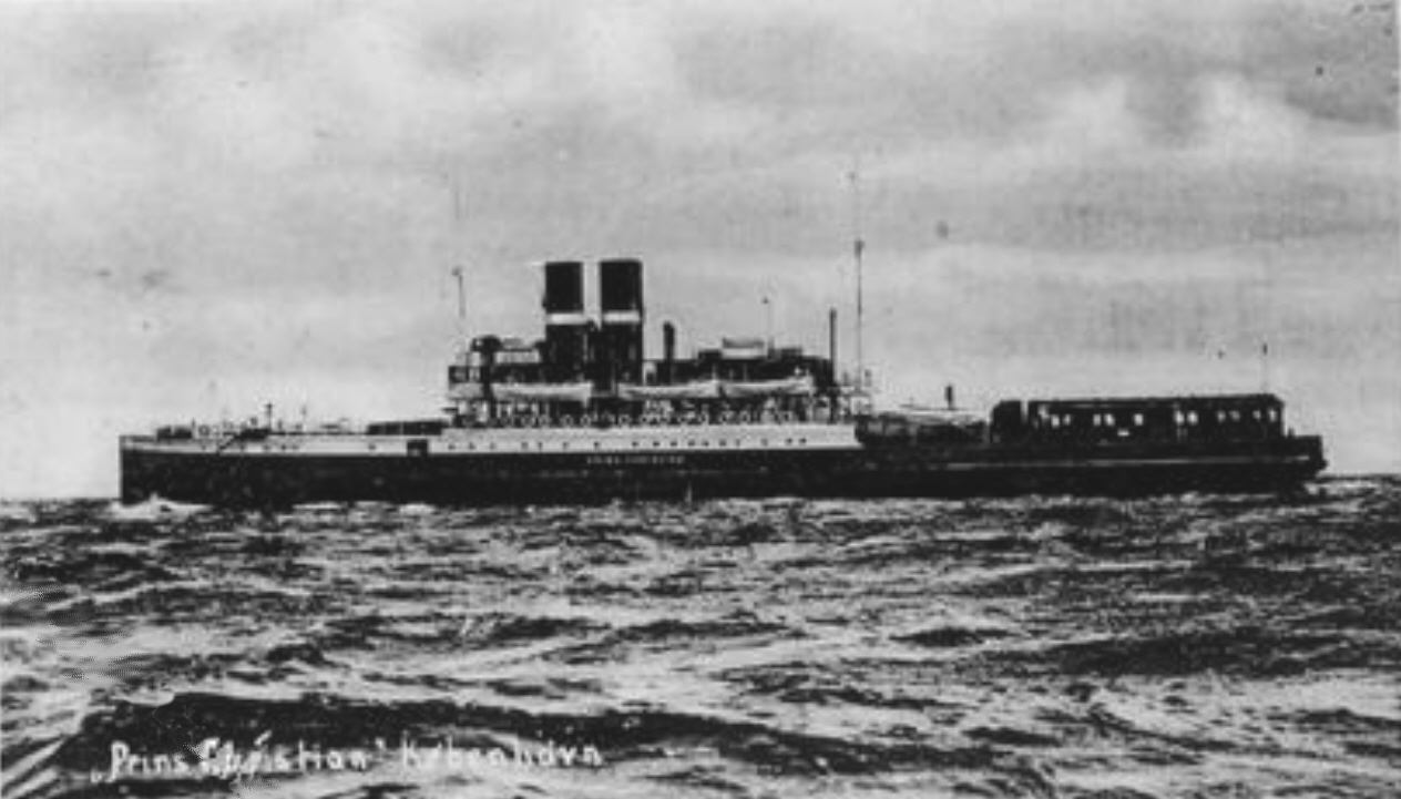 Eisenbahnfährschiff Prins Christian, Baujahr 1903, dänische DSB-Reederei, Fährlinie Gedser-Warnemünde, verschrottet 1955